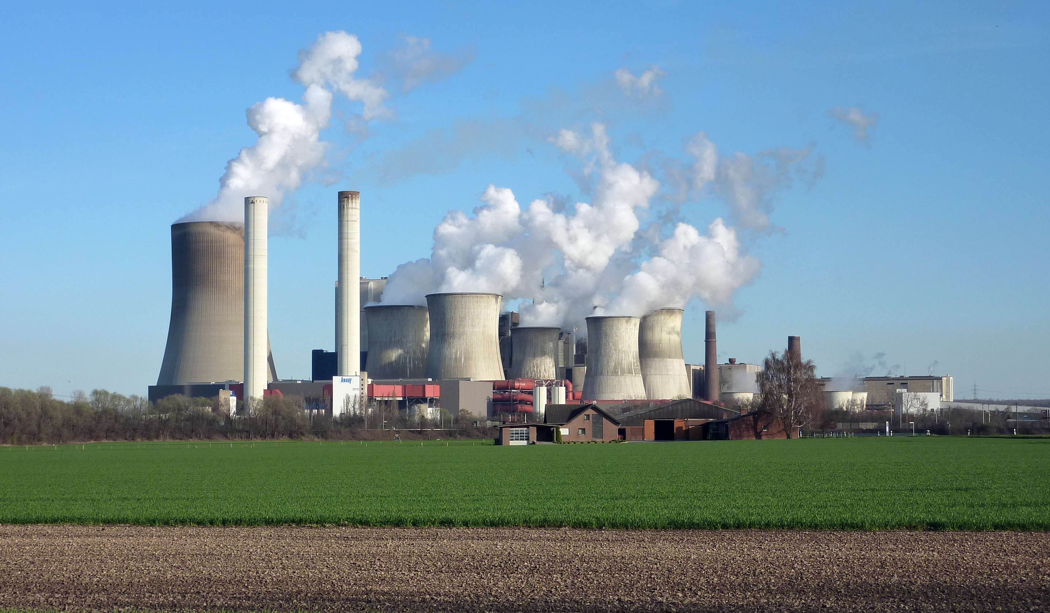 Ein Teil der Anlage von der Landstraße aus aufgenommen.